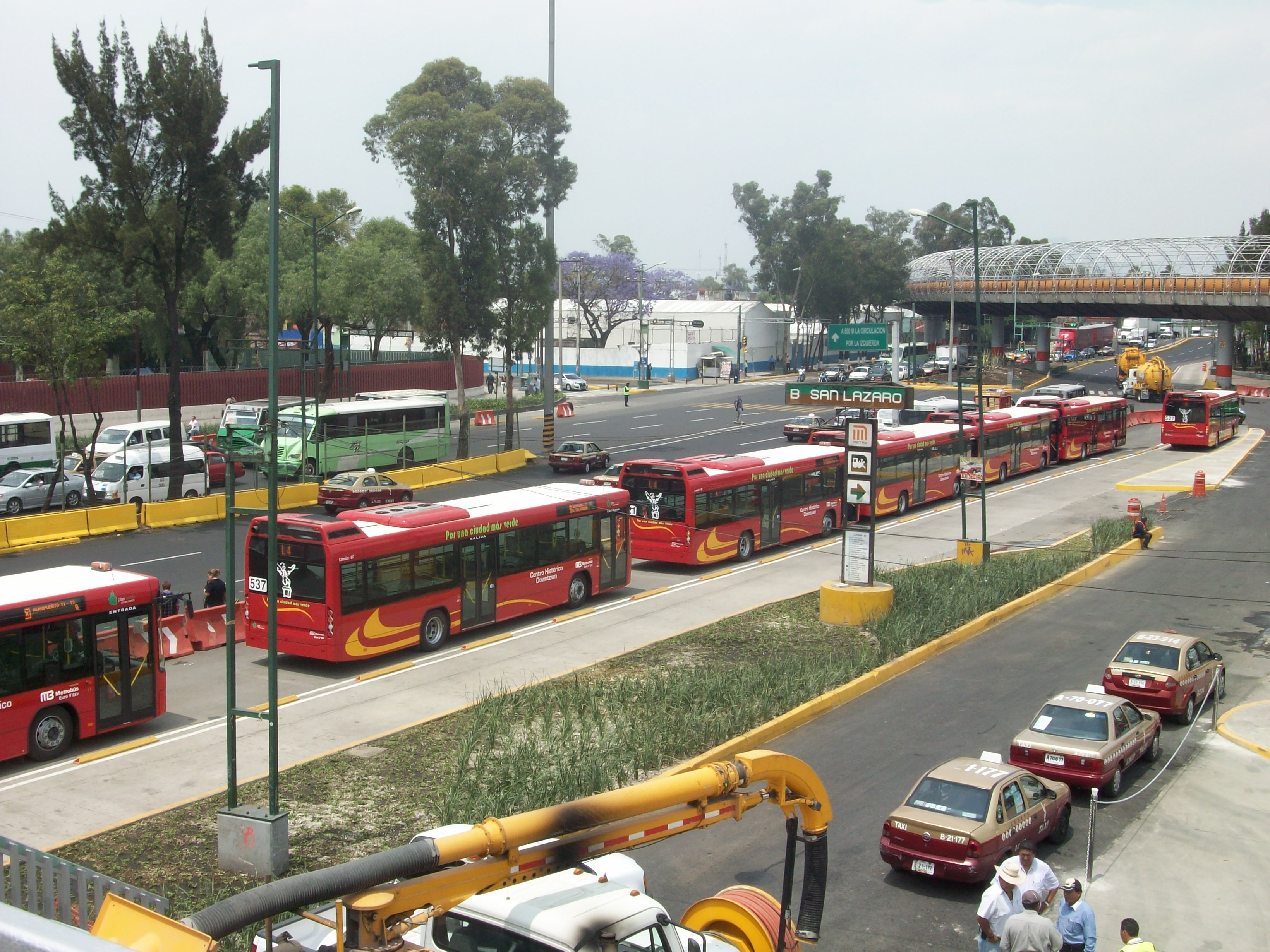 Metrobuses de la Linea 4 estacionados en San Lázaro